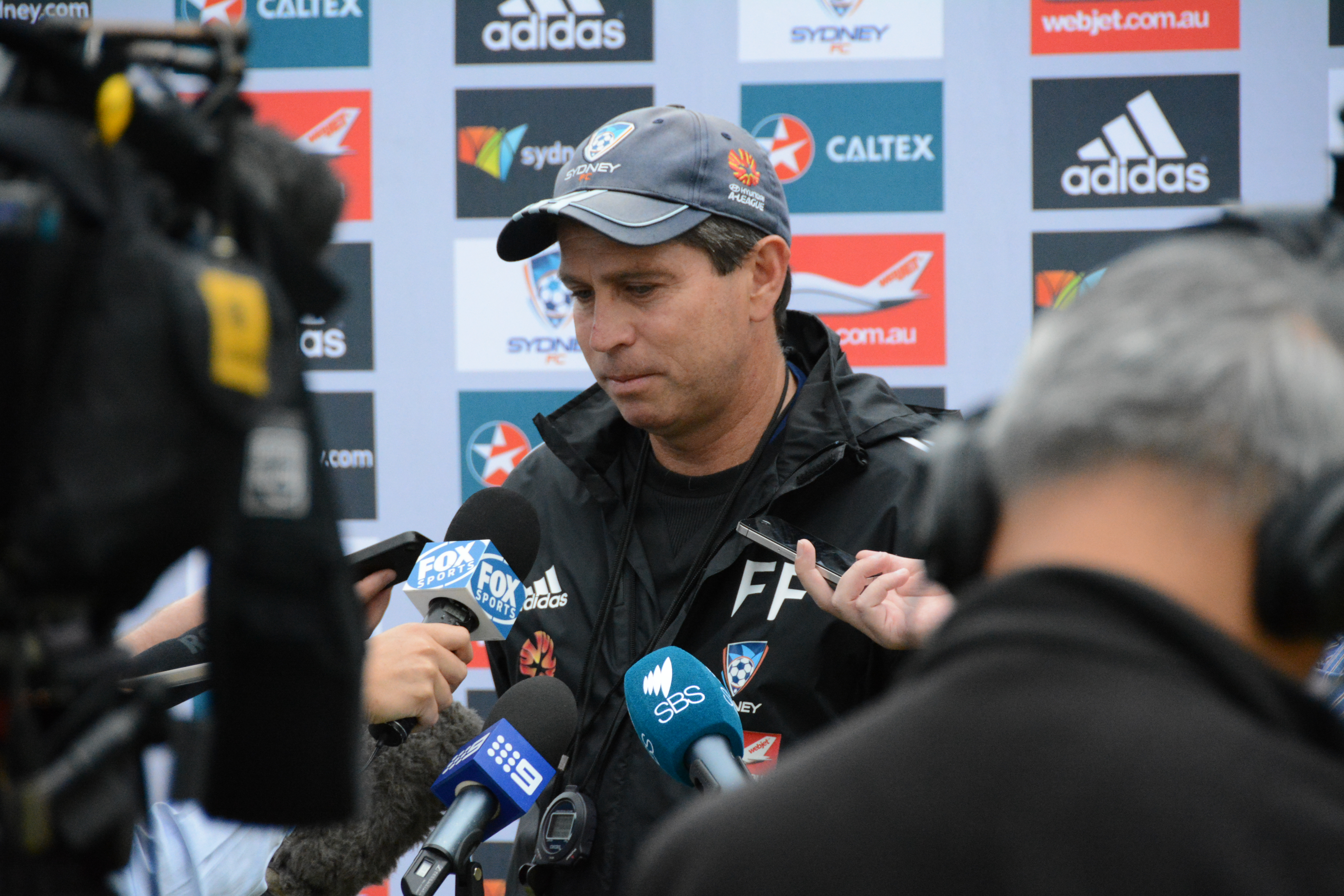 Photo by Pete Nowakowski